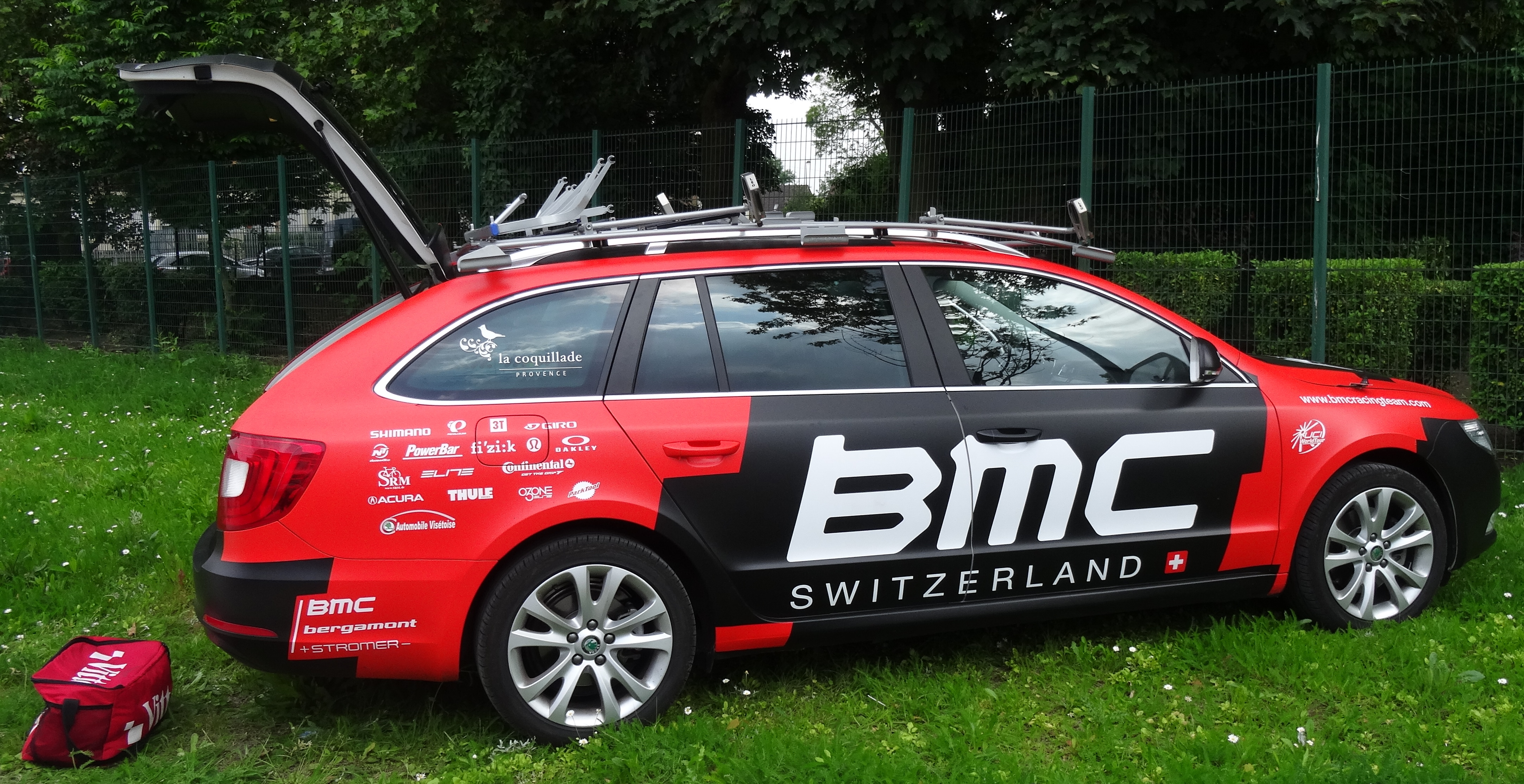 Reportage réalisé le dimanche 1er juin à l'occasion de l'arrivée du Paris-Roubaix espoirs 2014 au vélodrome André-Pétrieux à Roubaix, Nord, Nord-Pas-de-Calais, France.